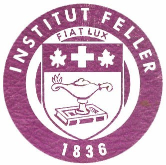 Emblème de l'Institut Feller, institution d'enseignement ayant existé de 1855 à 1967 à Grande-Ligne, au Québec.